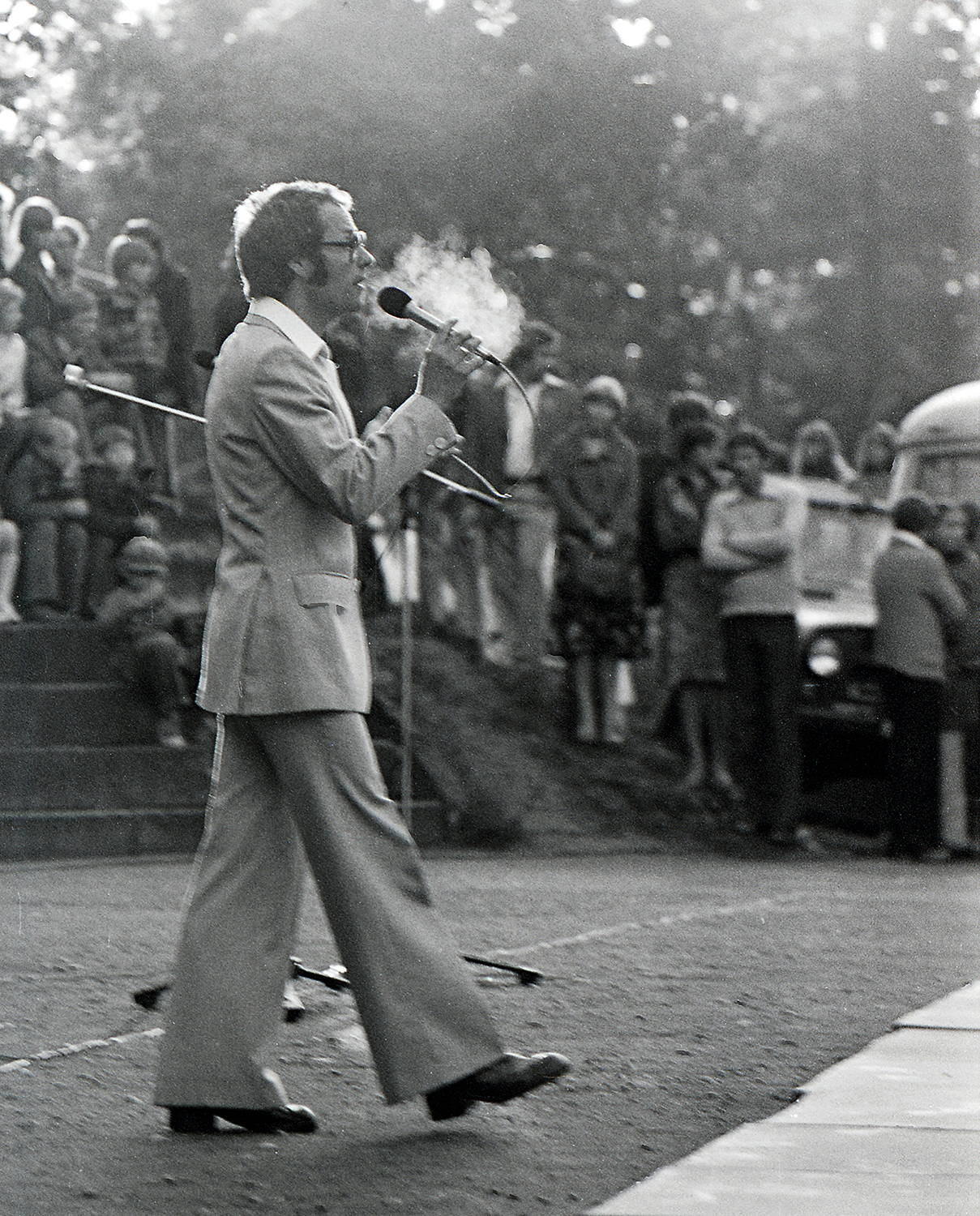 Paul Allik, kunstnik ja laulja 74